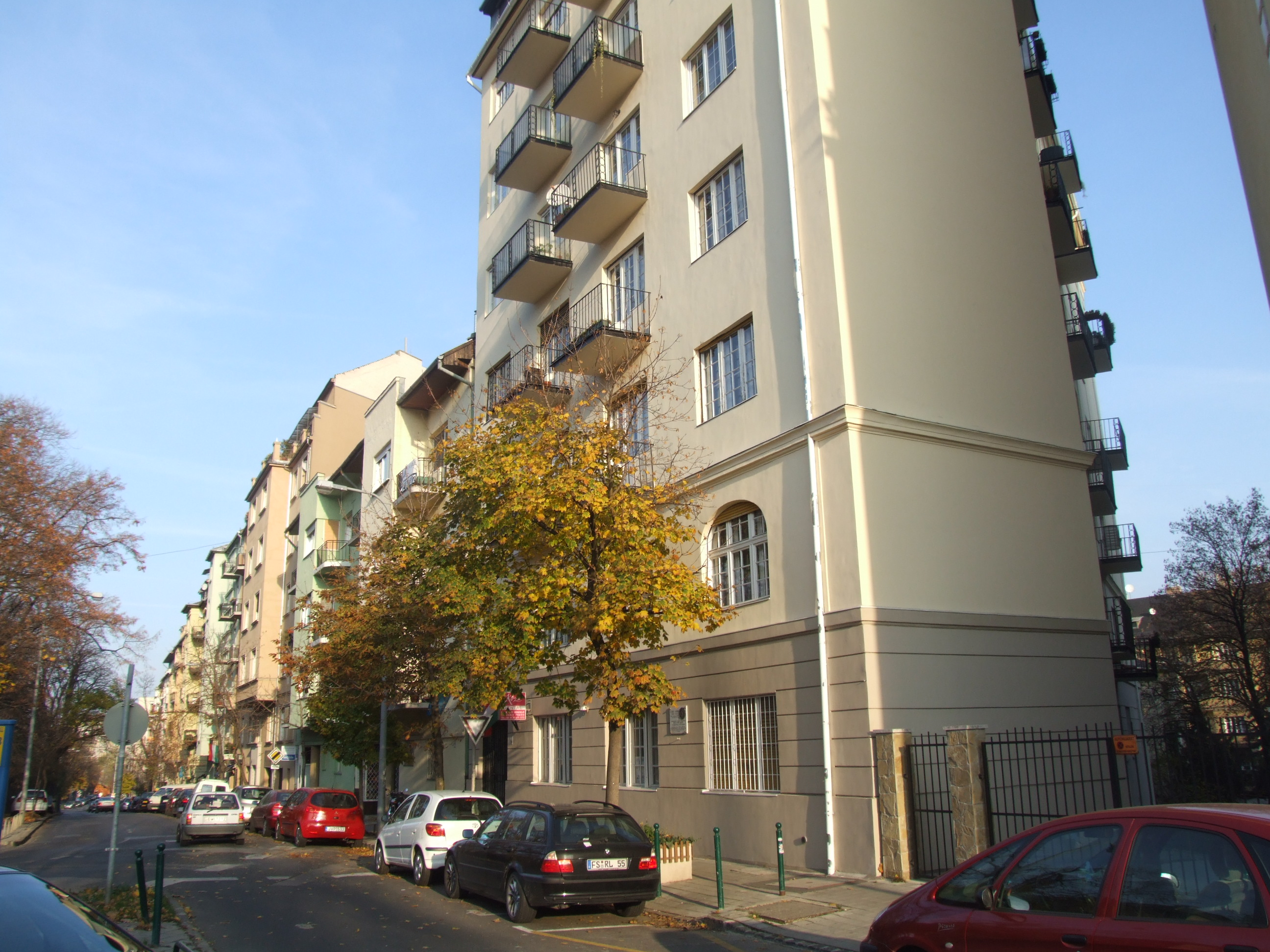 Szabó Lőrinc egykori lakhelye (Budapest, 12. ker., Németvölgyi út 16. (akkor 6.) számú ház